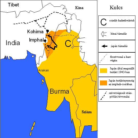 eredeti szerzője: Mike Young, magyarosította: user:Talmann